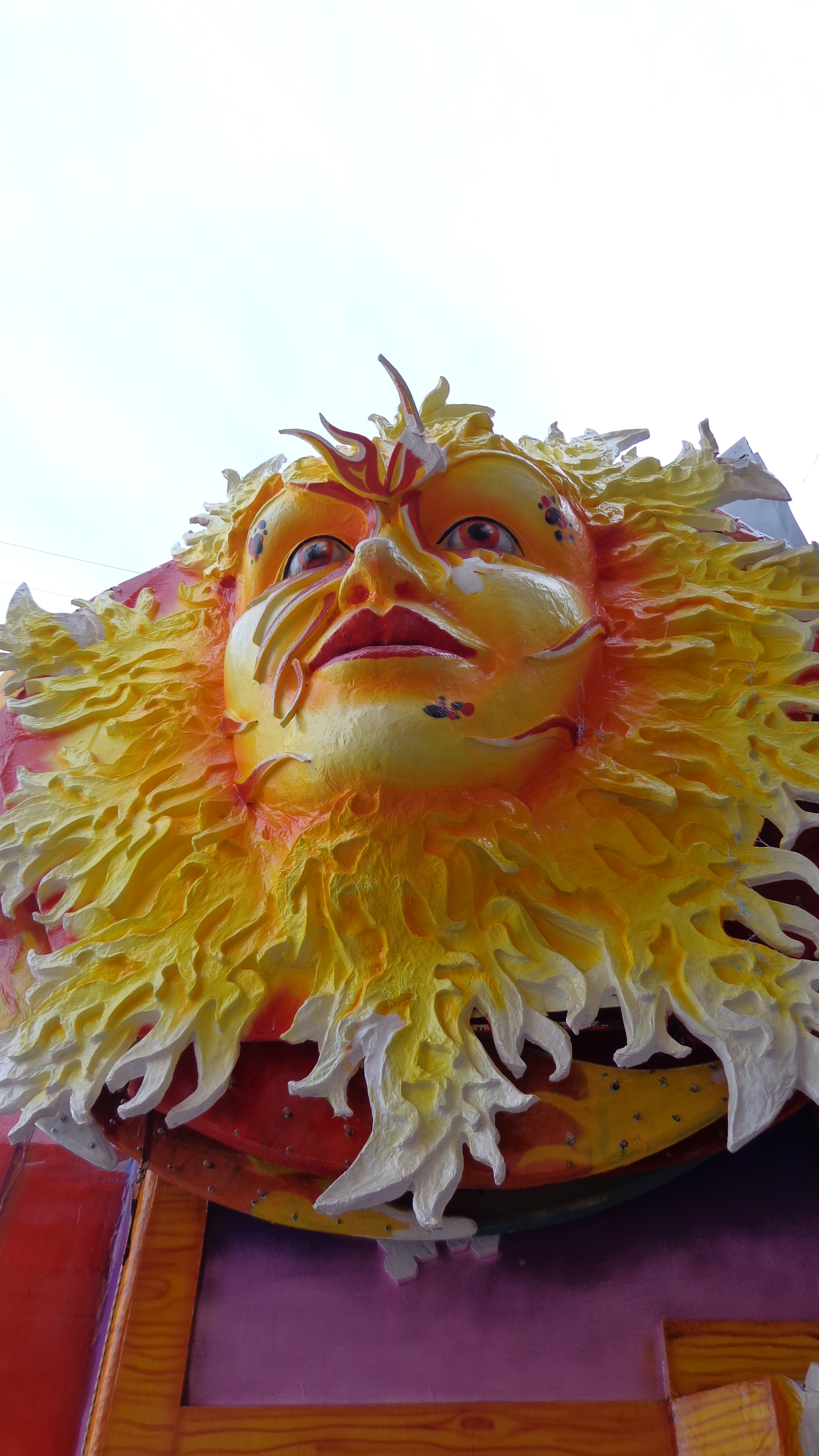 Dettaglio carro allegorico